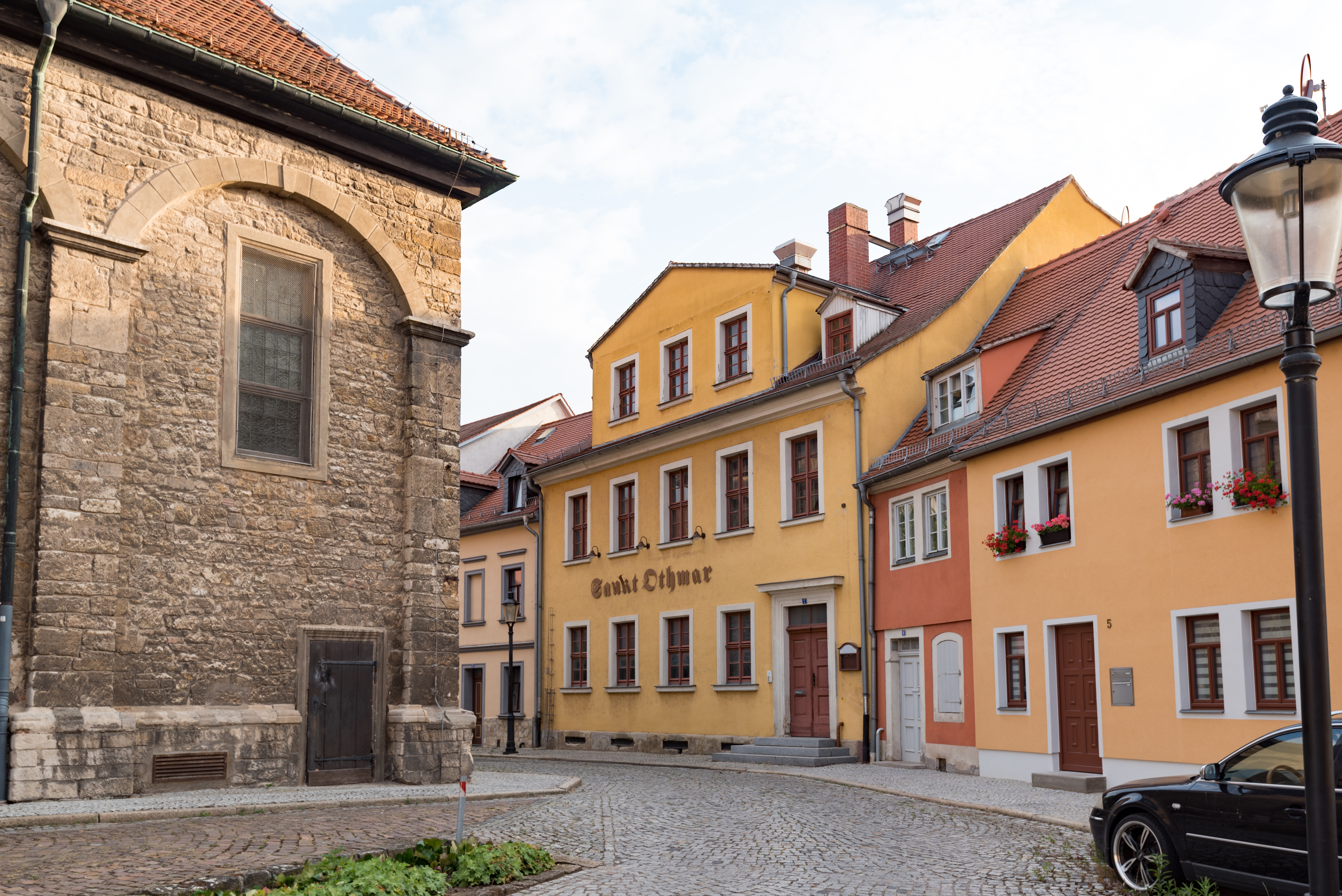 Naumburg (Saale), Othmarsplatz 7